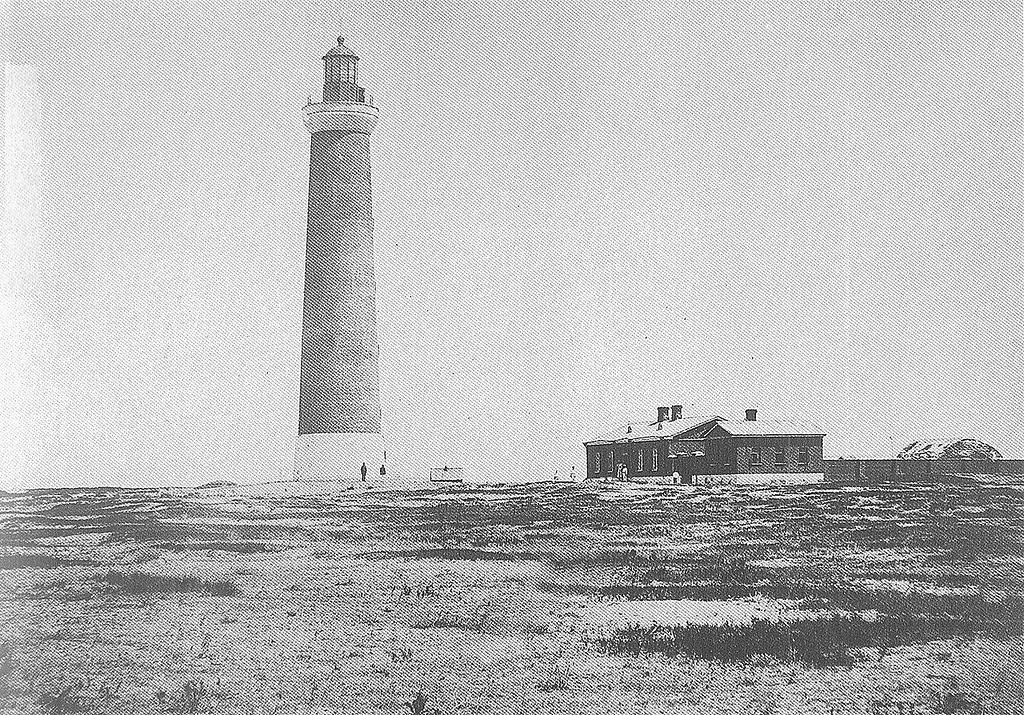 Маяк на острове Чечень, 1870 - 1880 гг. Фото С. М. Вишневского. Суровая, голая, пустынная земля.